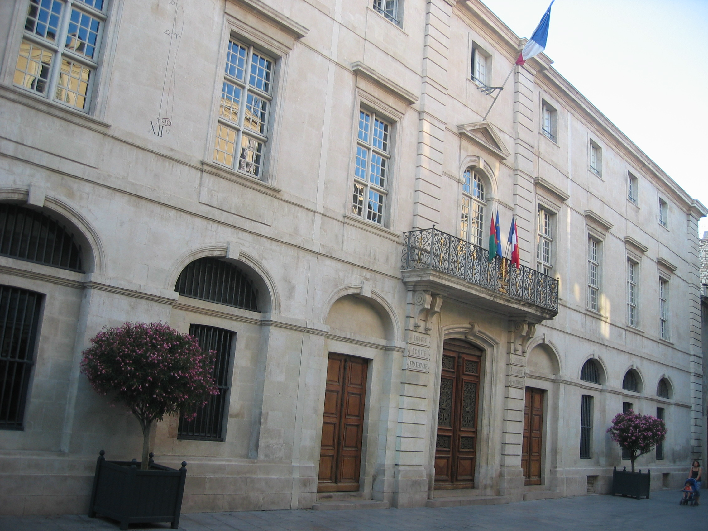 La Mairie de Nîmes. Photo de Nicolas Cadène. Propre travail, libre de droits (domaine public).